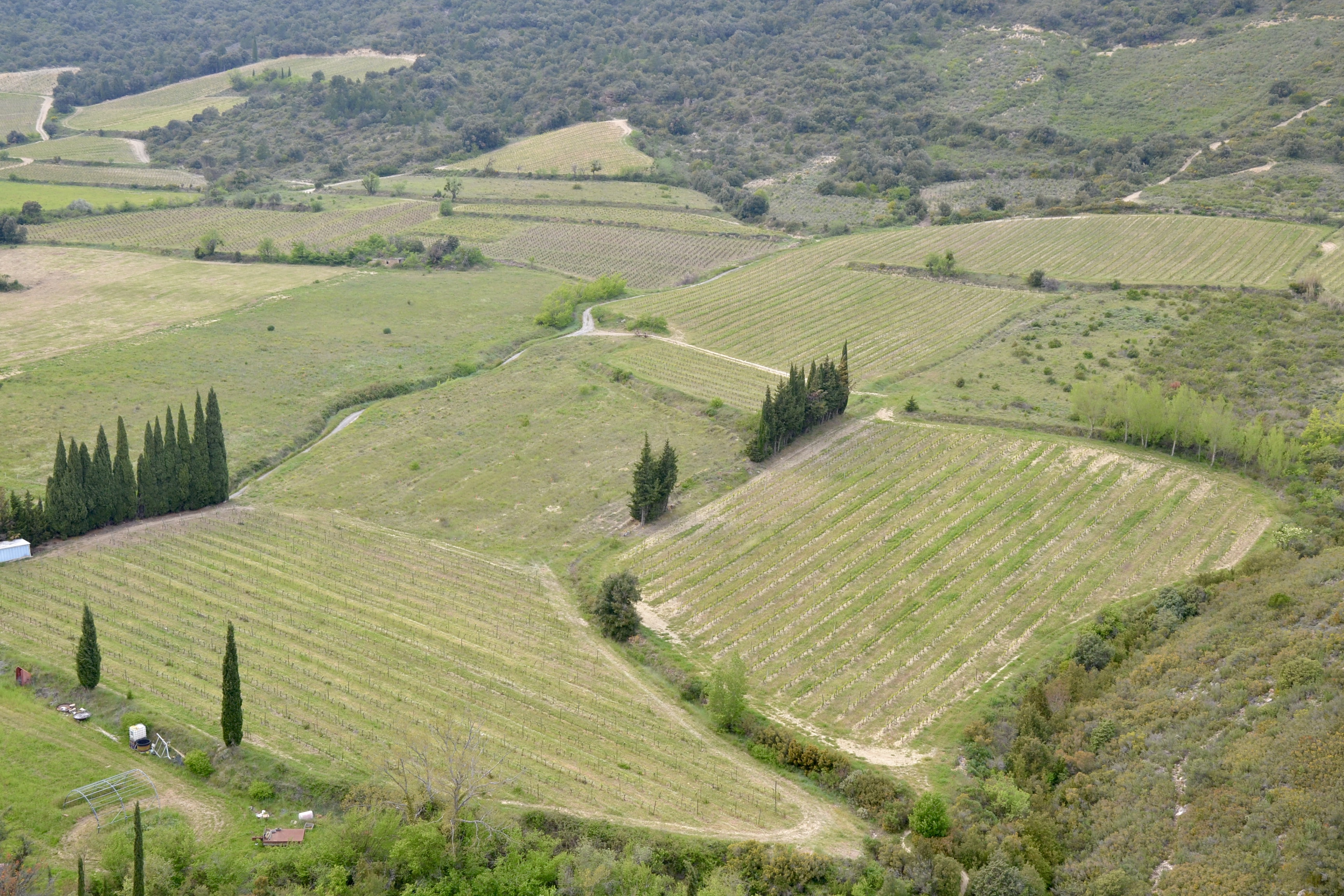 Vignes près de Cucugnan (Aude, France).